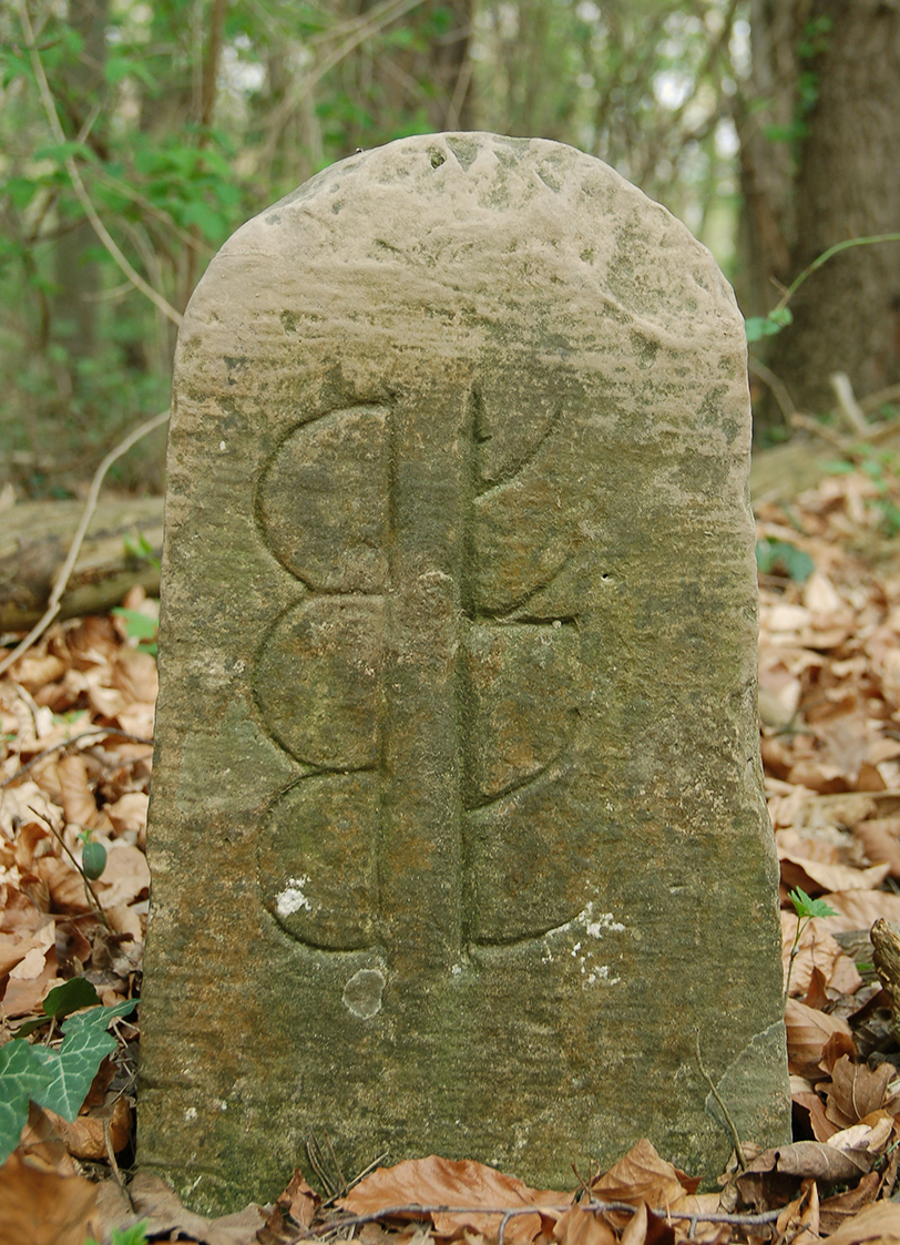 Enzweihinger Wappen auf Grenzstein bei Burg Dauseck. Rückseite Unterriexingen (Gänsefuß)